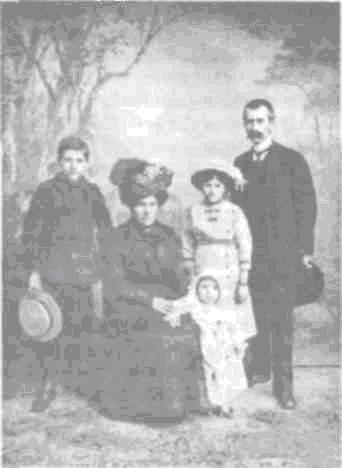 Anastas Lozanchev family